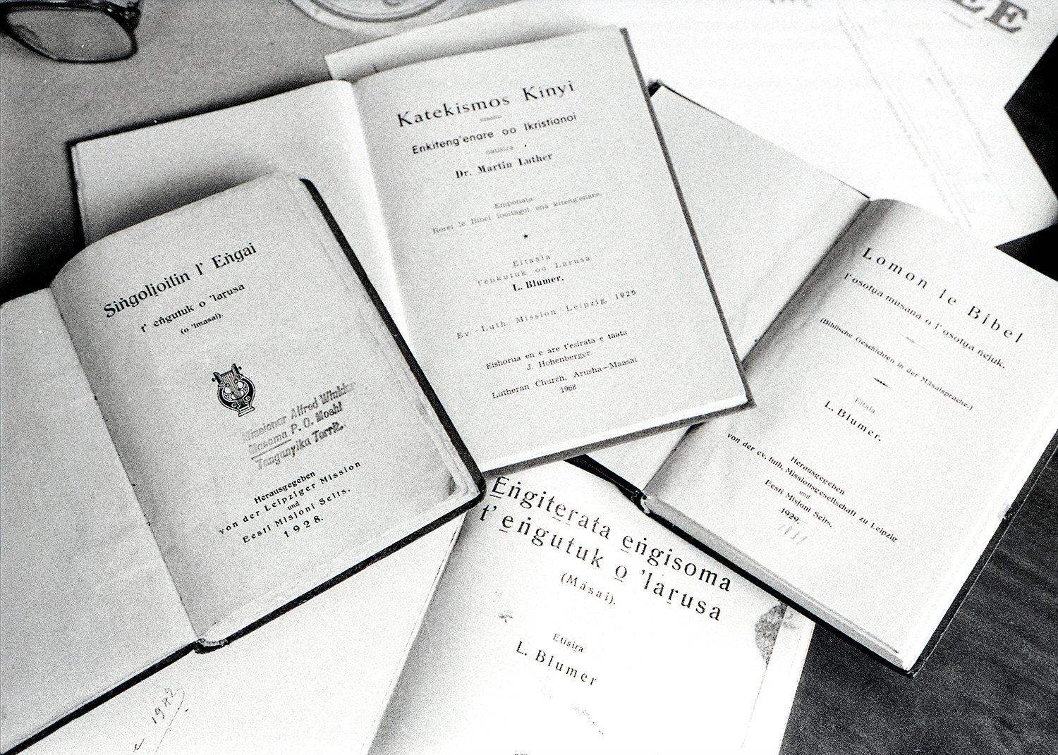 Leonhard Blumeri, eesti afrikanist trükised, Arusha 94